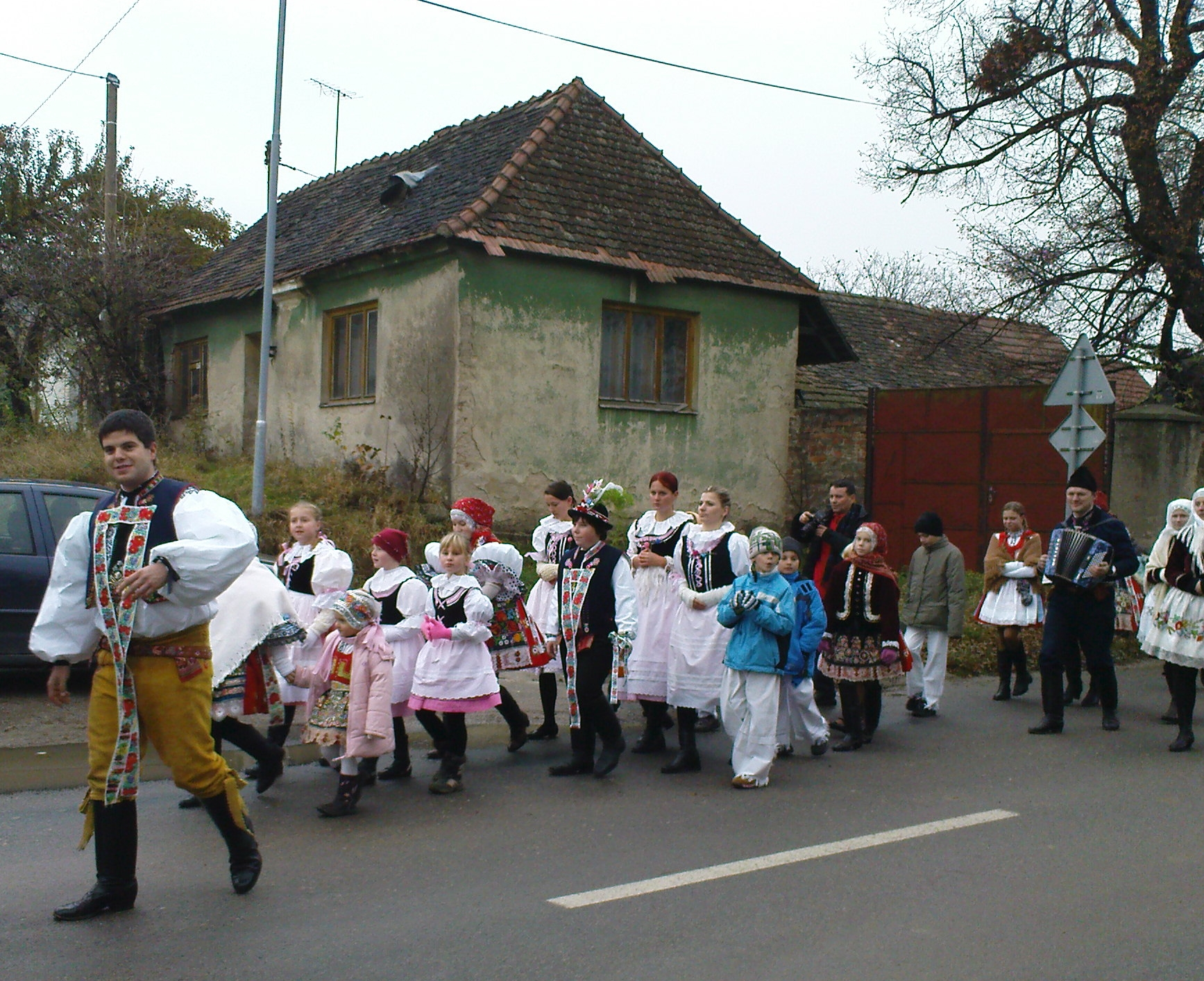 Hody v Bohuslavicich